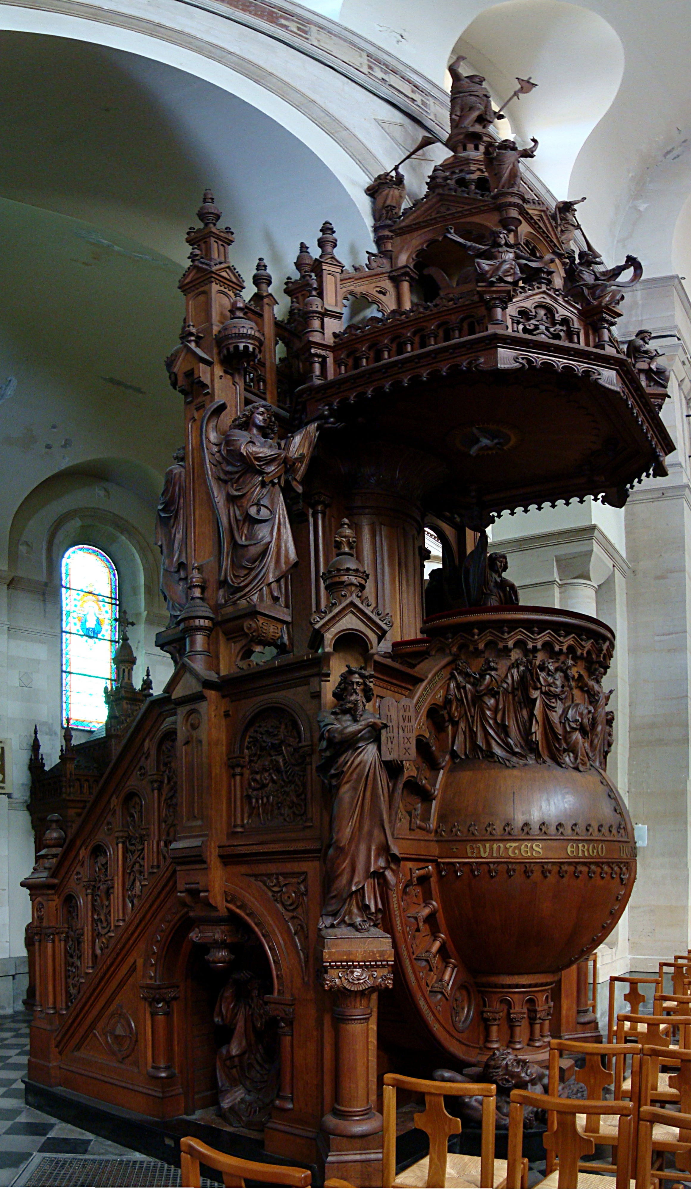 La chaire à prêcher de style néo-gothique de l'église Saint-Sauveur de Lille (Nord) réalisée par le menuisier sculpteur Gustave Pattein au début du 20ème siécle.